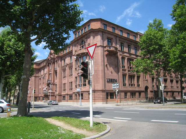 BW Bank